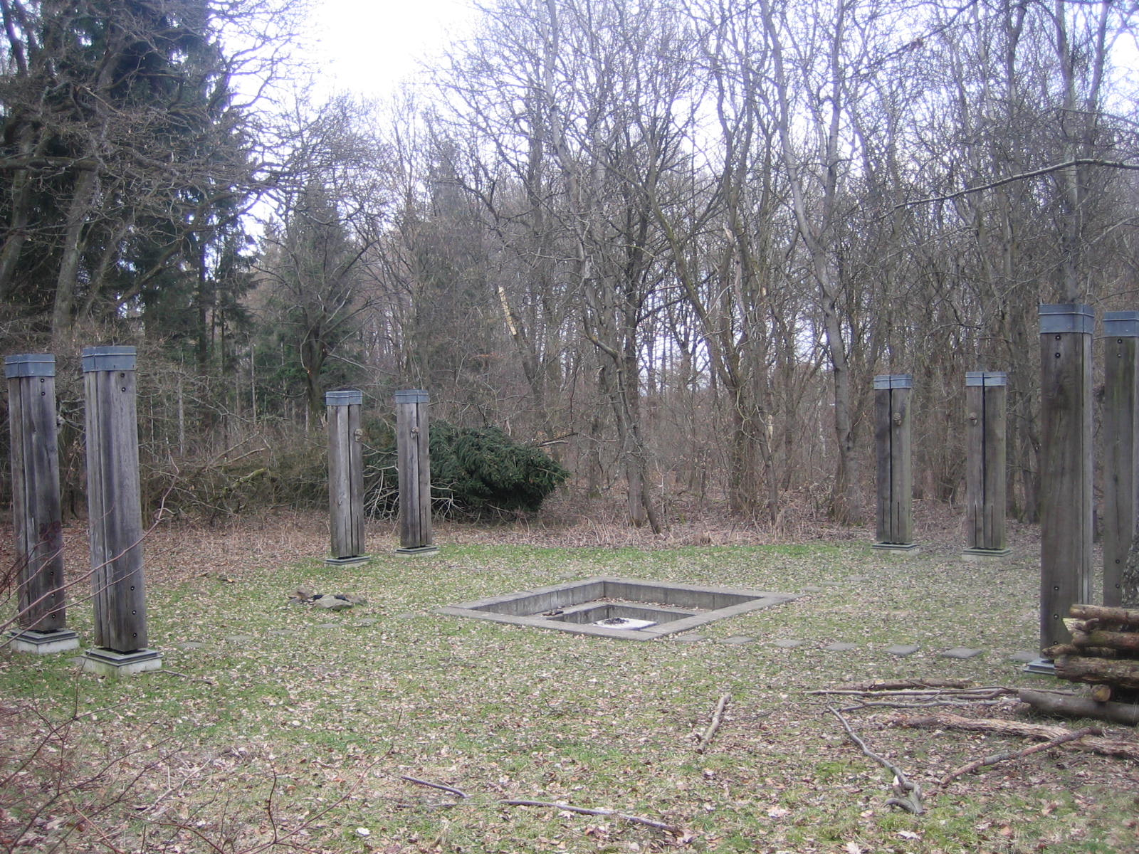 Werner Ruhnau Grabanlage auf einem öffentlichem Friedhof in Kassel